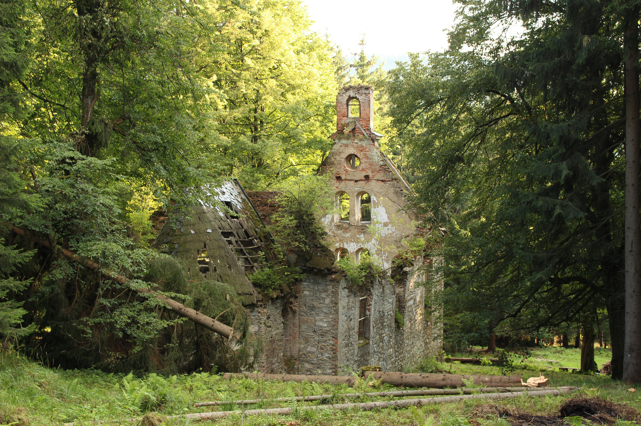 ruiny kaple svaté Marty, Horní Údolí, okres Jeseník, Olomoucký kraj